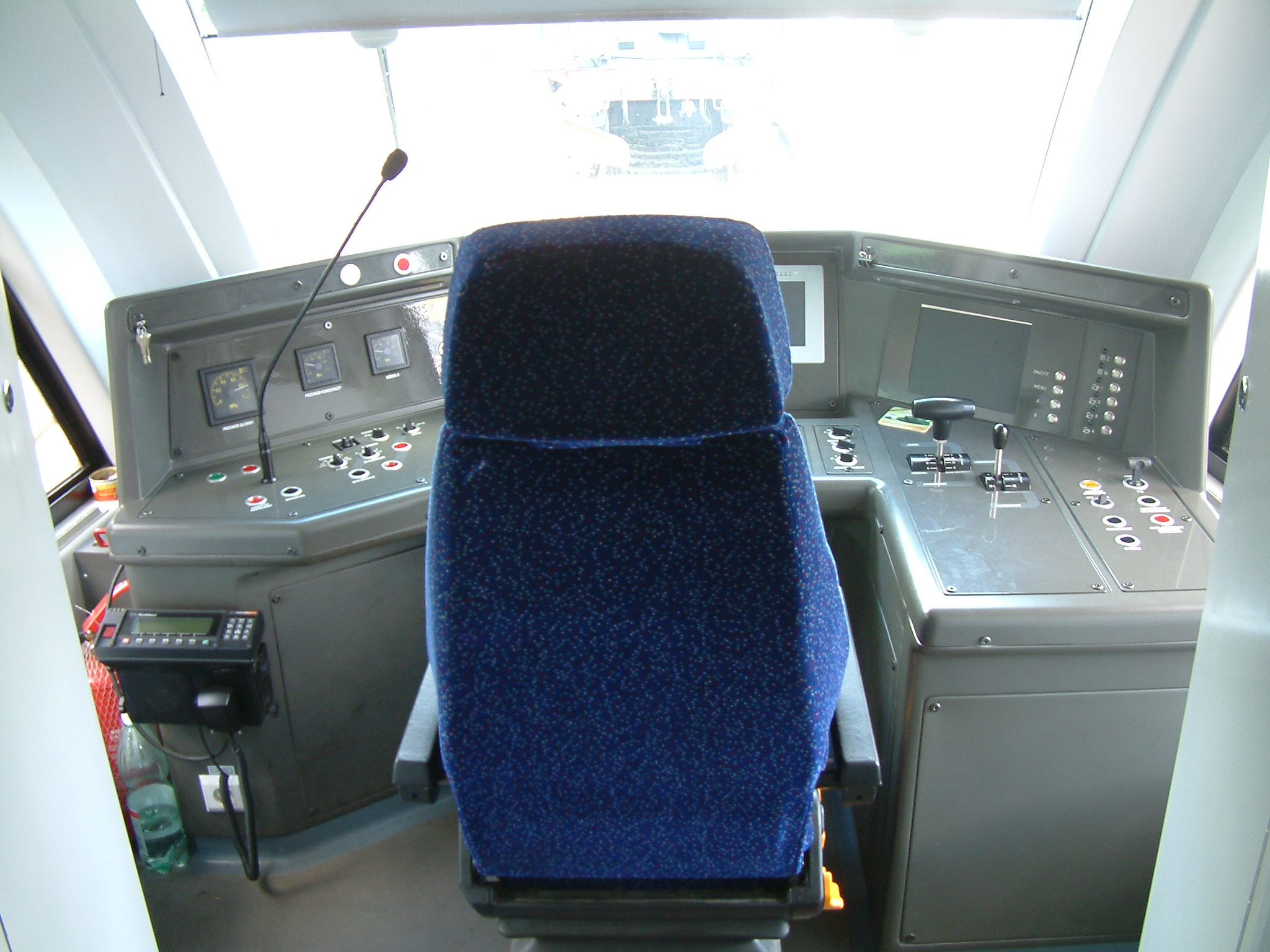 DMU SA132-008 in Poznań, control panel